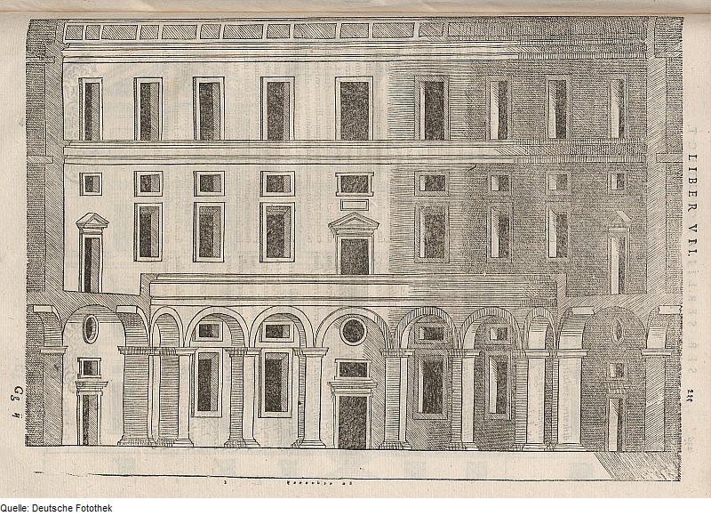 Original image description from the Deutsche Fotothek Architektur & Fassade & Bogen & Mezzanin & Giebel